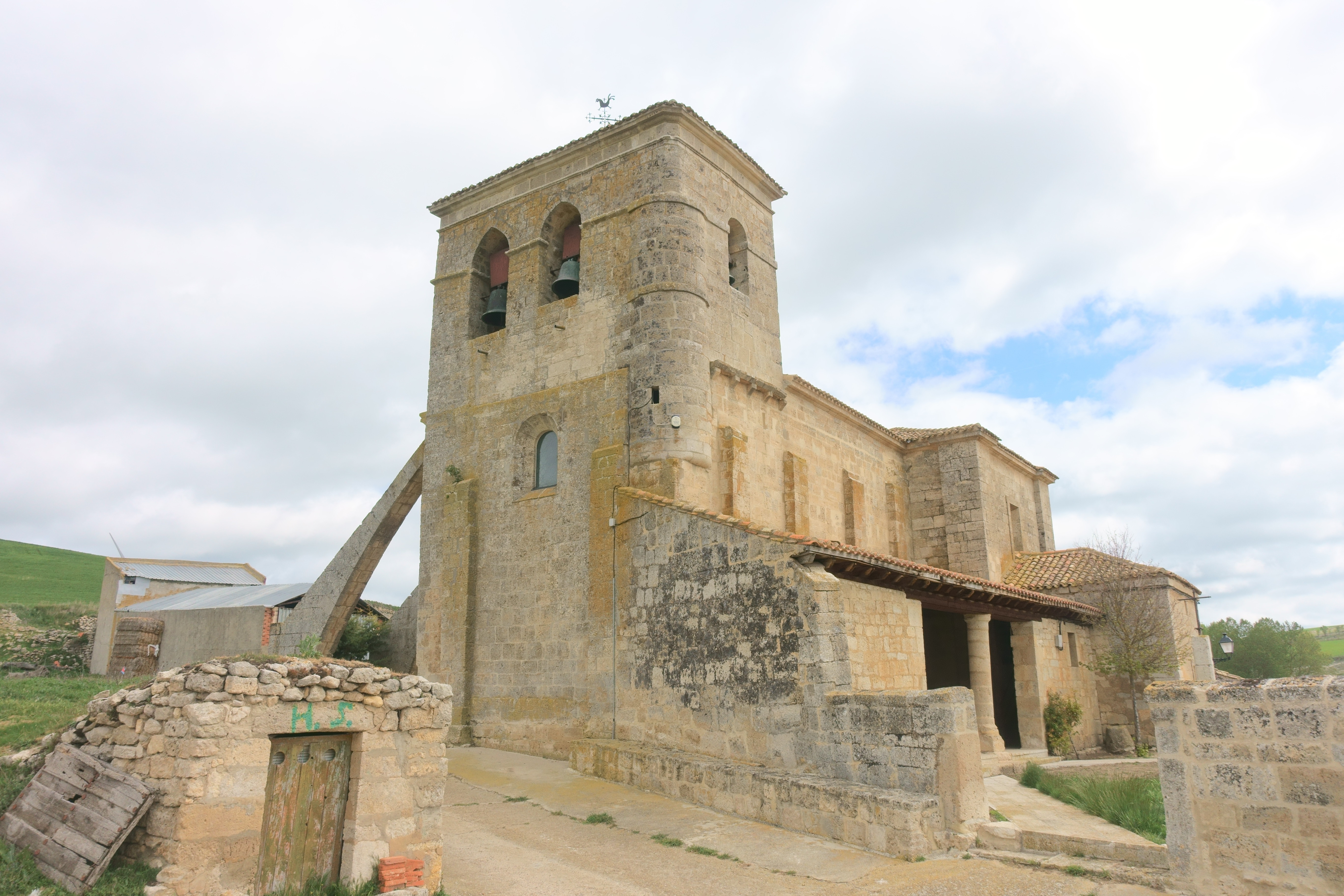 Iglesia de San Pedro, Castellanos de Castro (Burgos, España).